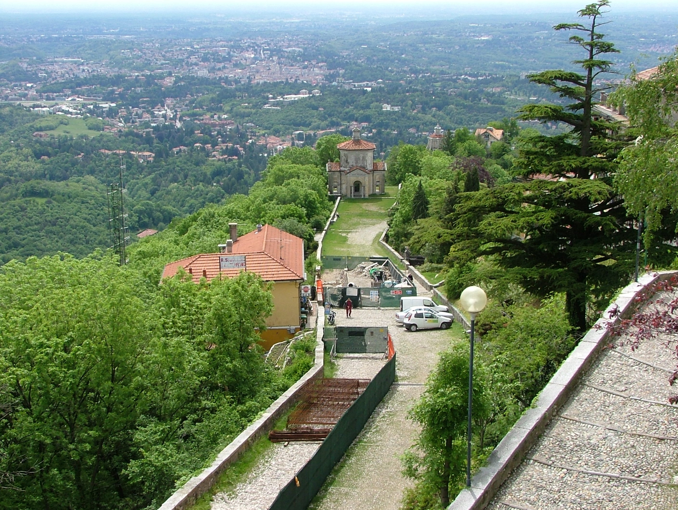 Blick zurück über Varese